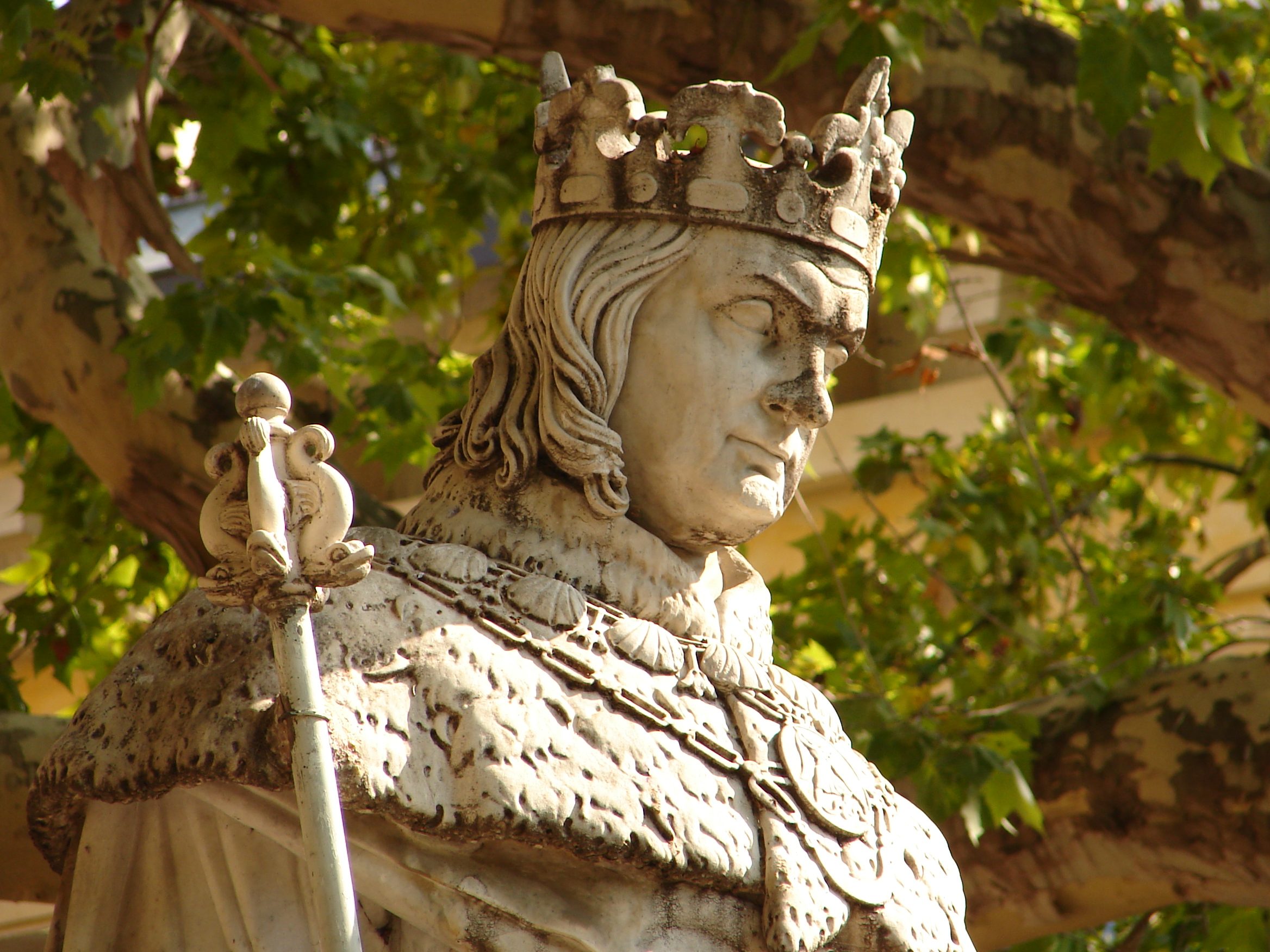 Gros plan sur la statue du Roi René en haut du cours Mirabeau à Aix-en-Provence